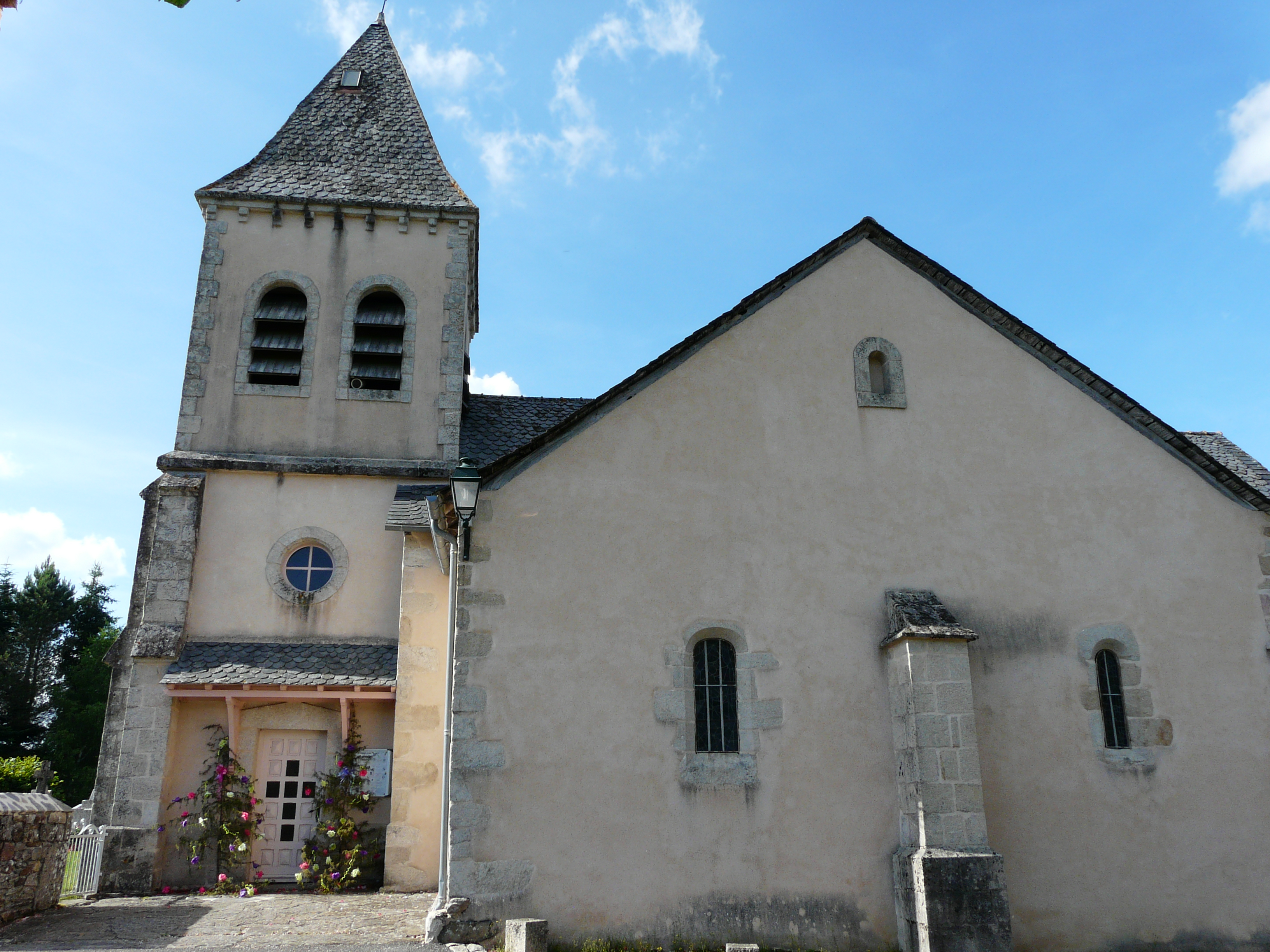 L'église de Reygade, Corrèze, France.